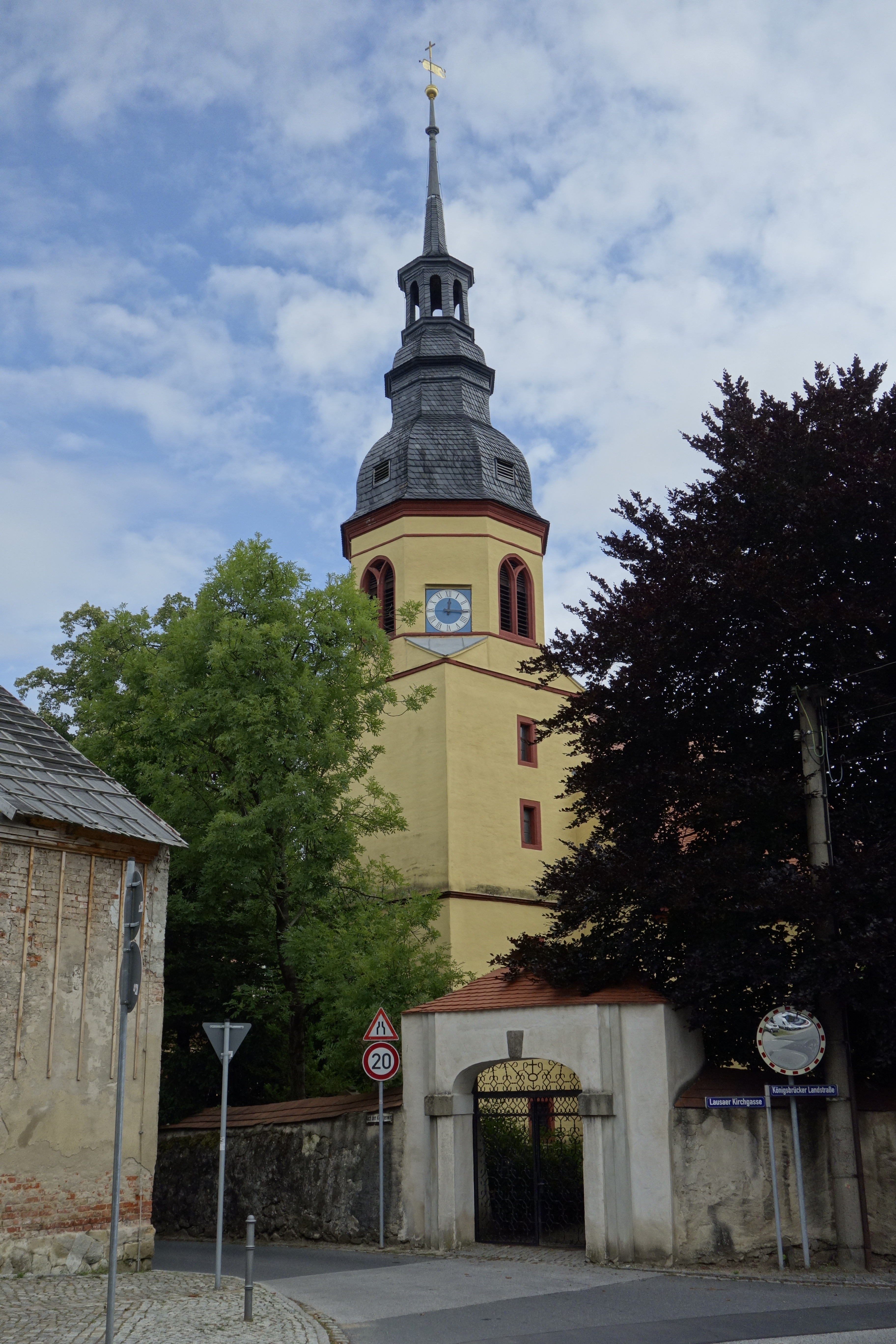 Kirche Lausa Juli 2017 (1)